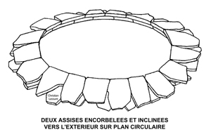 Vue latérale de deux assises encorbelées et inclinées vers l'extérieur sur plan circulaire dans une cabane en pierre sèche. Dessin de Christian Lassure. / Side view of two successive circular courses of corbelled and outwardly inclined stones in a dry stone hut. Drawing by Christian Lassure.